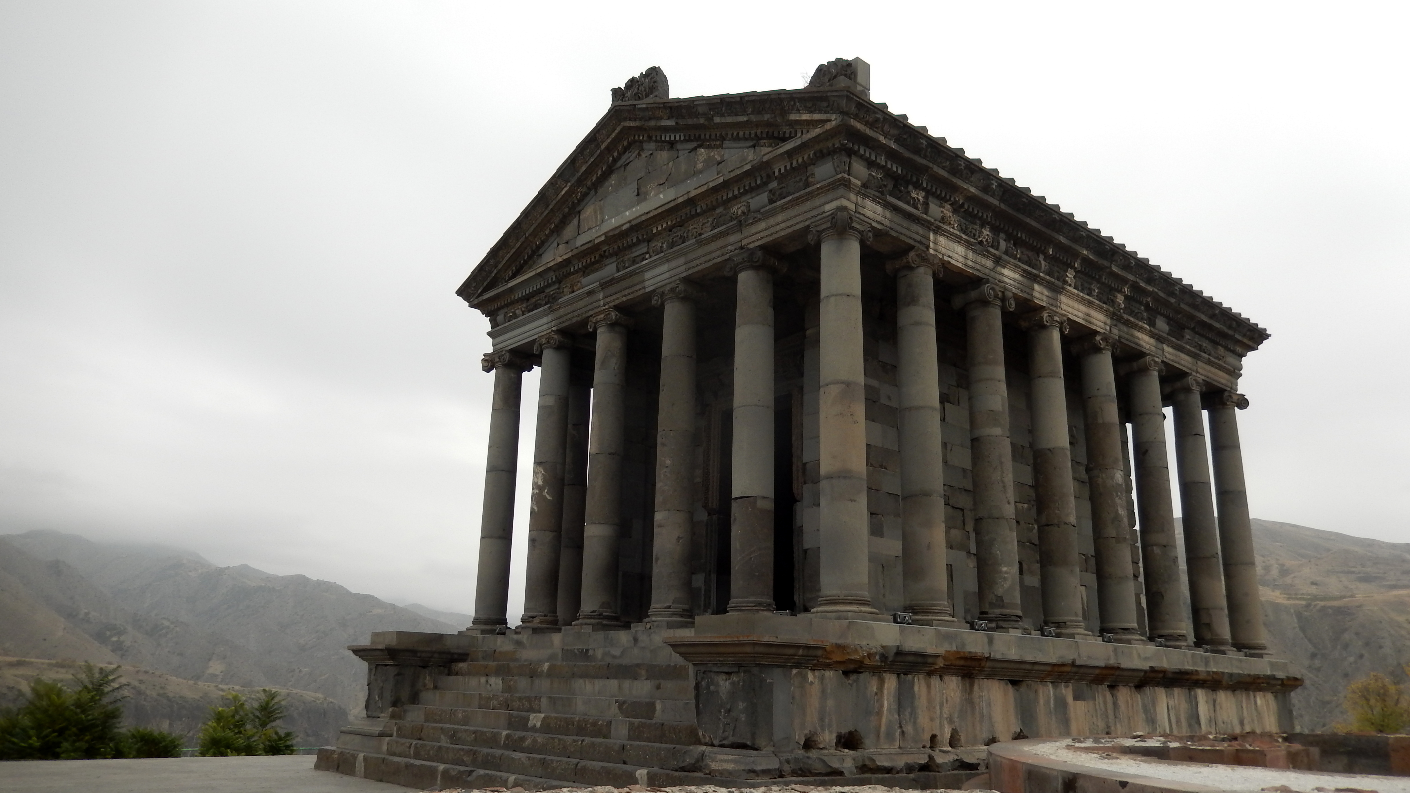 Գառնի 21/4.2